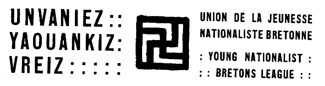 Logo de l'"Unvaniez Yaouankiz Vreiz" utilisé à partir de février 1925, figurant un Hévoud en son centre.